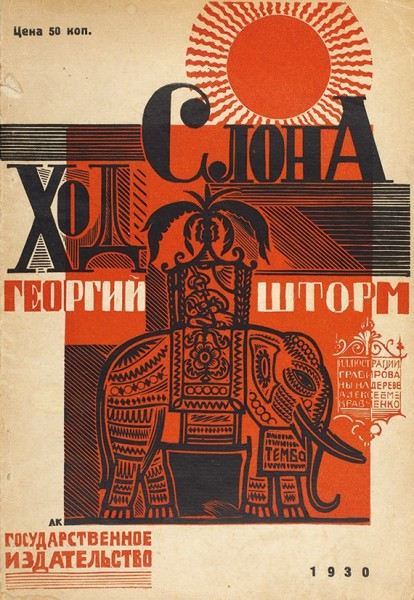 А. Кравченко. Обложка книги Шторм, Г. Ход слона. [Повесть] / гравюры на дереве Алексея Кравченко. М.; Л.: Государственное издательство, 1930. 79 с.: ил. 19,5 х 13,5 см.